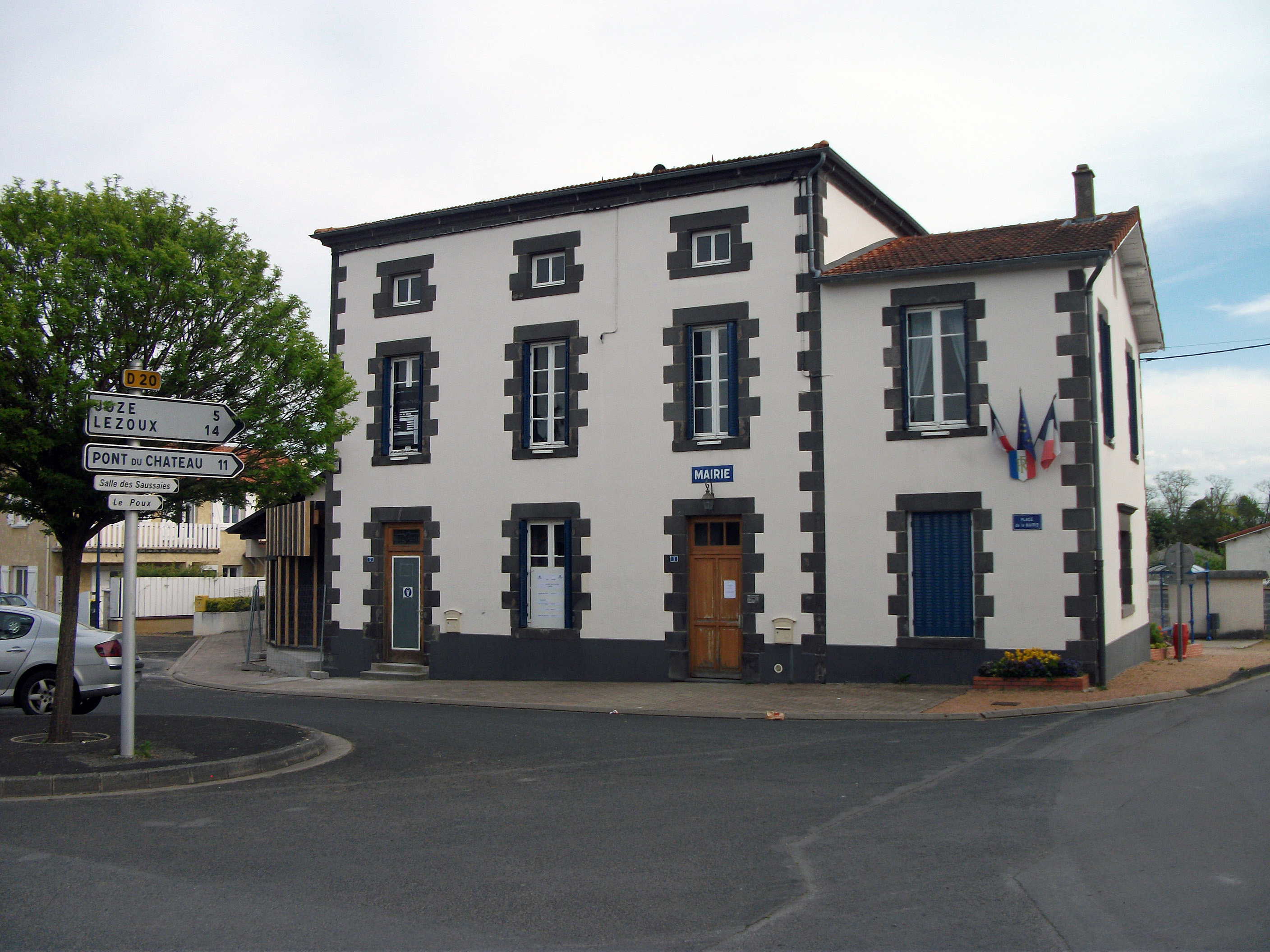 Town hall of Entraigues, Puy-de-Dôme / Mairie d'Entraigues (Puy-de-Dôme) [10796]